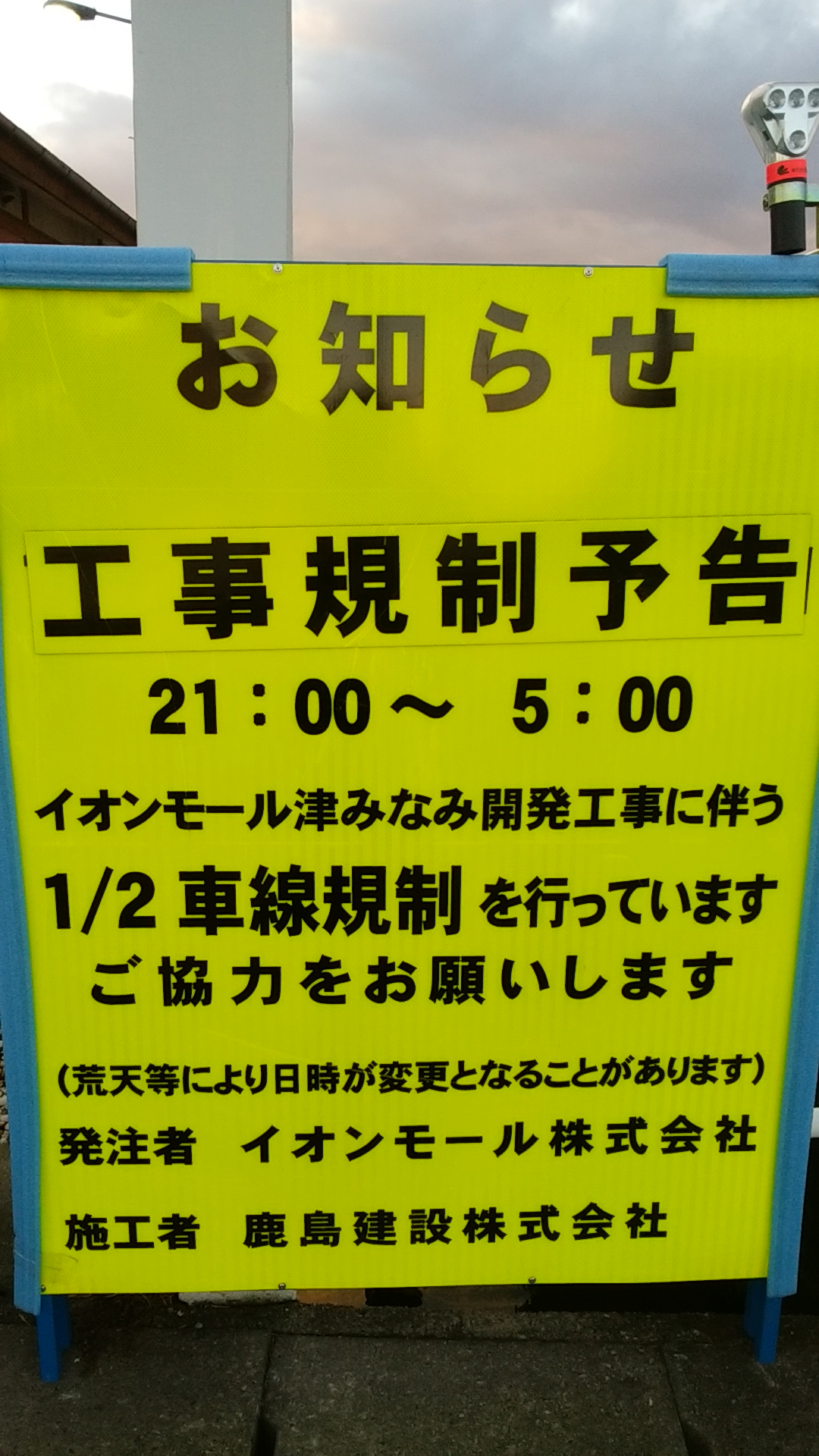 2016年2月29日に閉店した｢イオン津南ショッピングセンター サンバレー｣の建て替え工事をする旨が書かれた看板です。